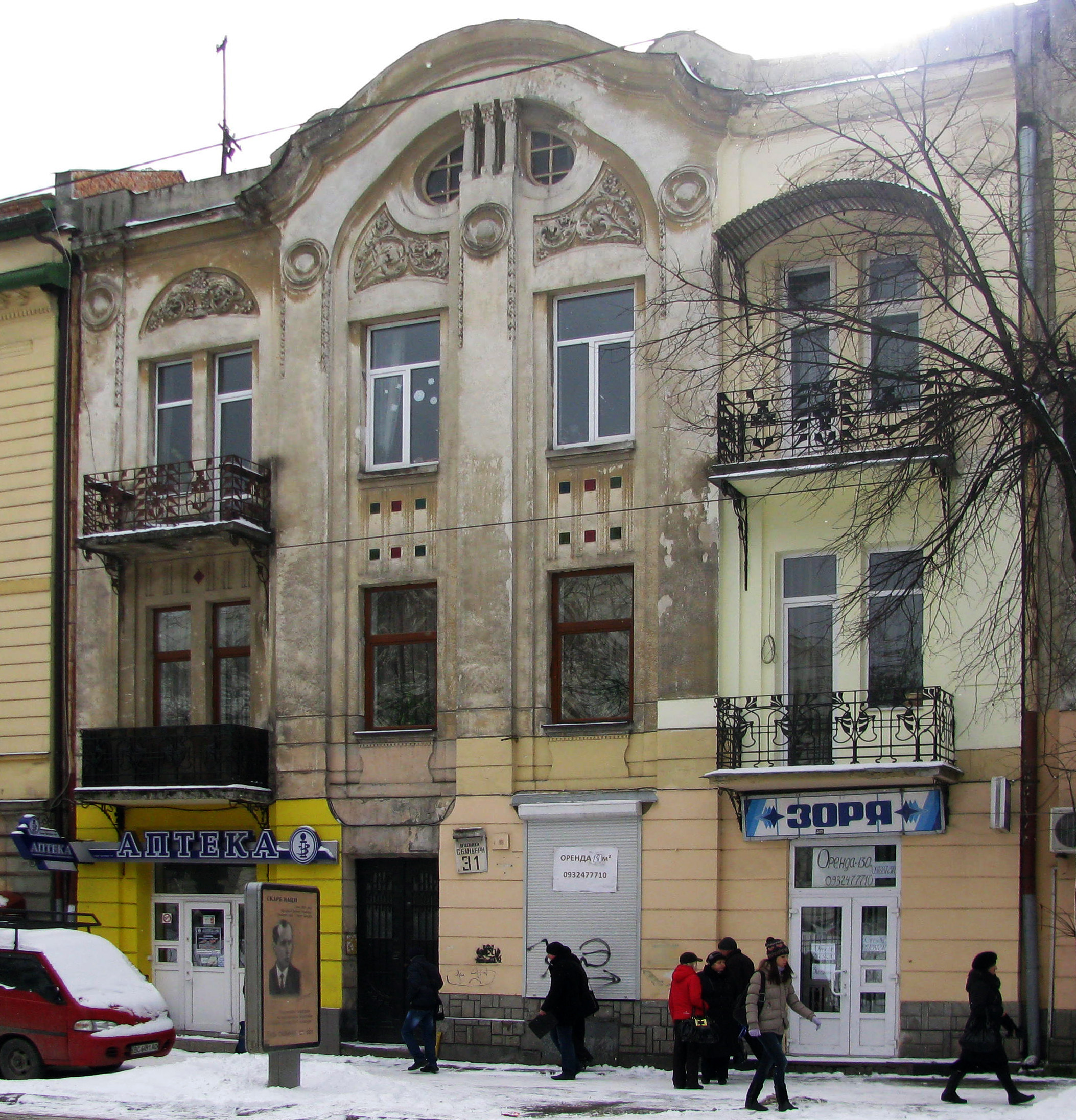 Будинок №31 на вулиці Бандери у Львові.